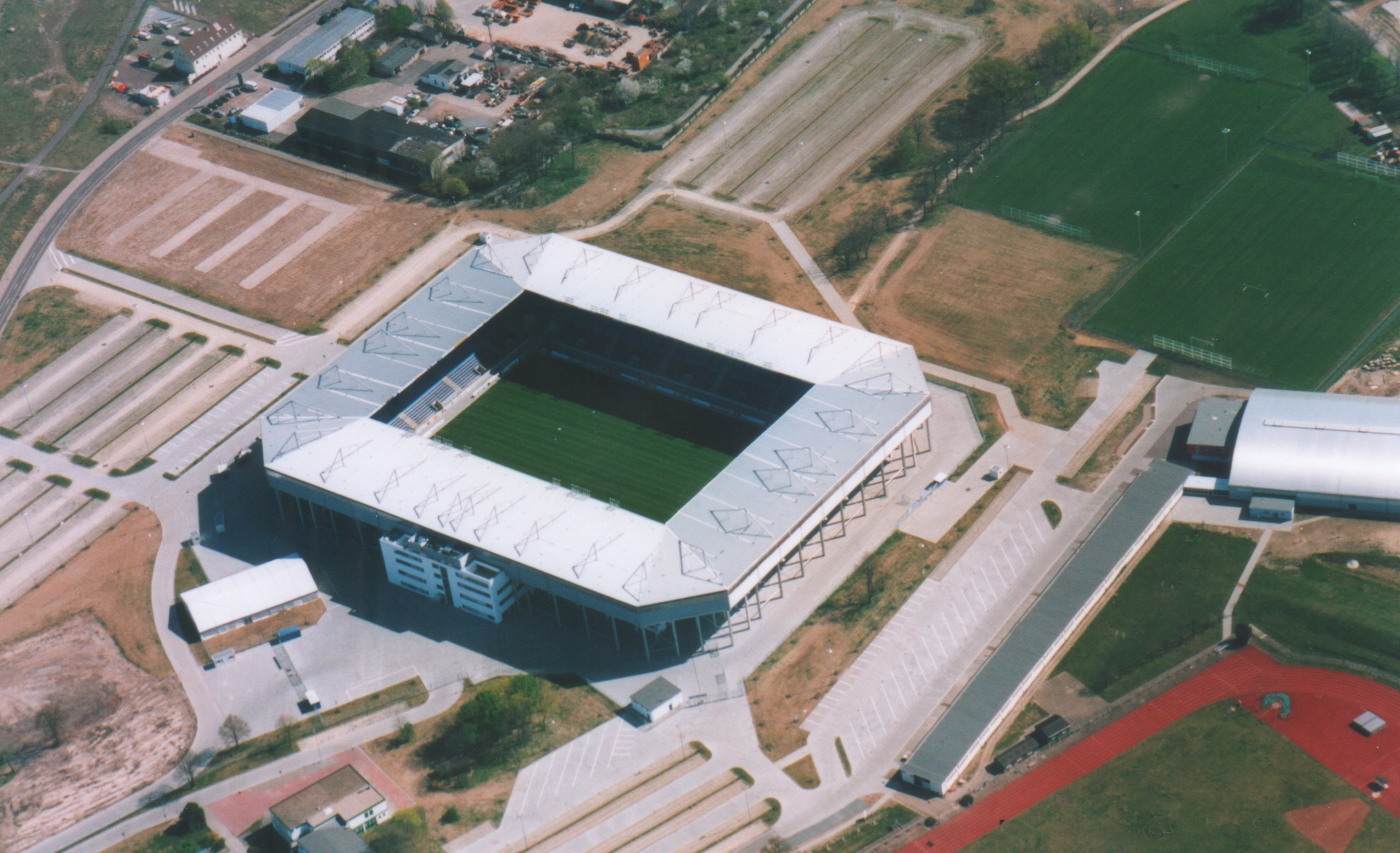 Luftaufnahme des Stadion Magdeburgs